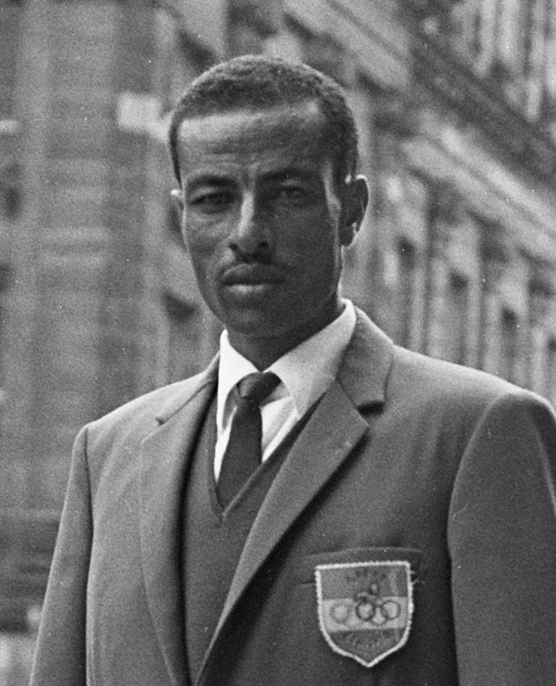 Abebe Bikila in Amsterdam